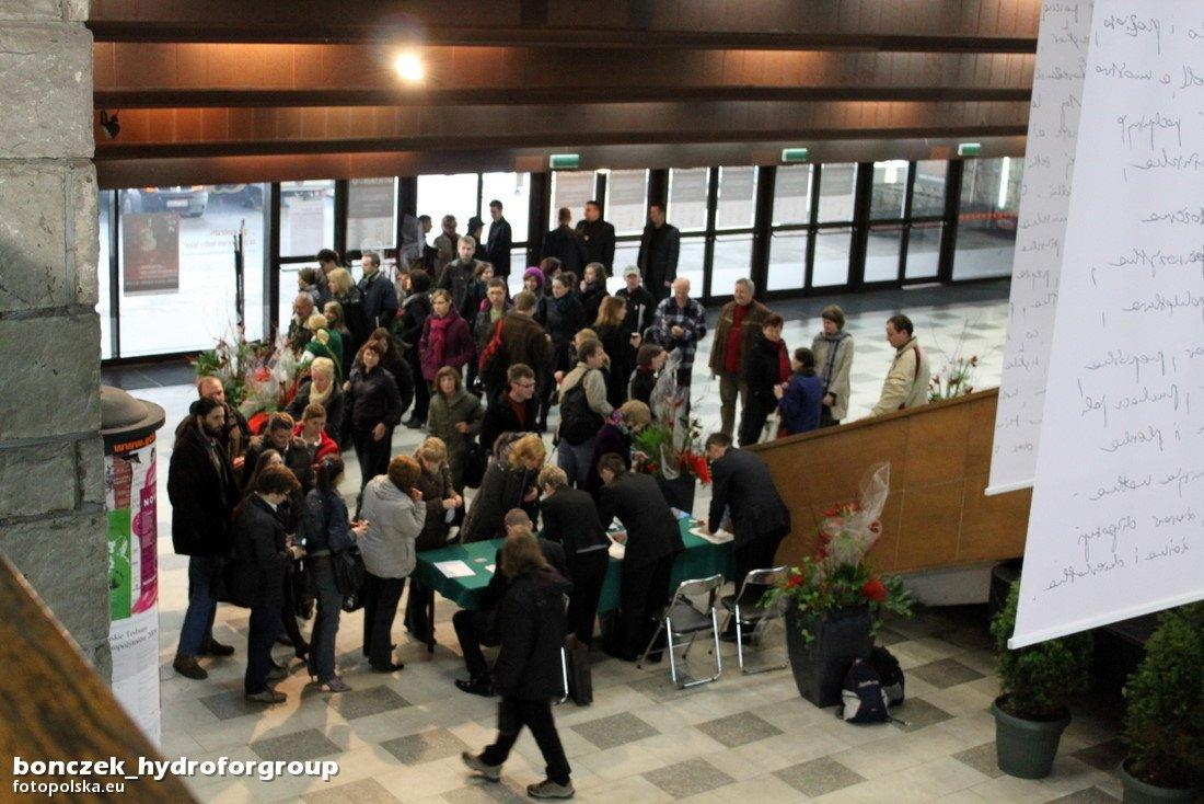 Potwierdzenie przyjazdu i autoryzacja przed wejściem na salę